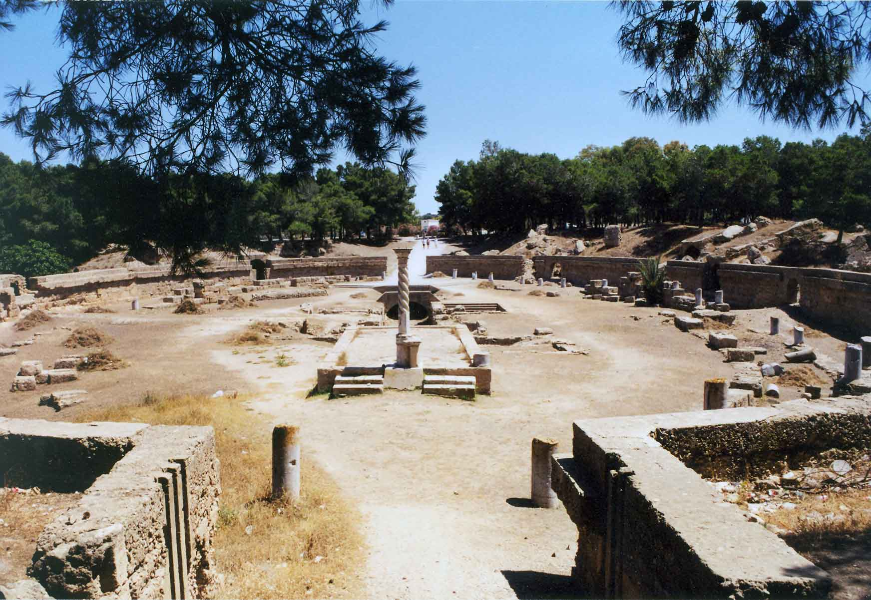 Amphithéâtre de Carthage - 2005 Collection personnelle Bertrand Bouret